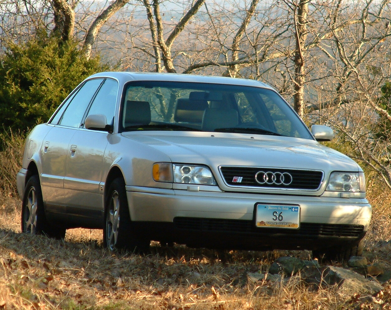 1995 Audi S6 sedan (US-spec)